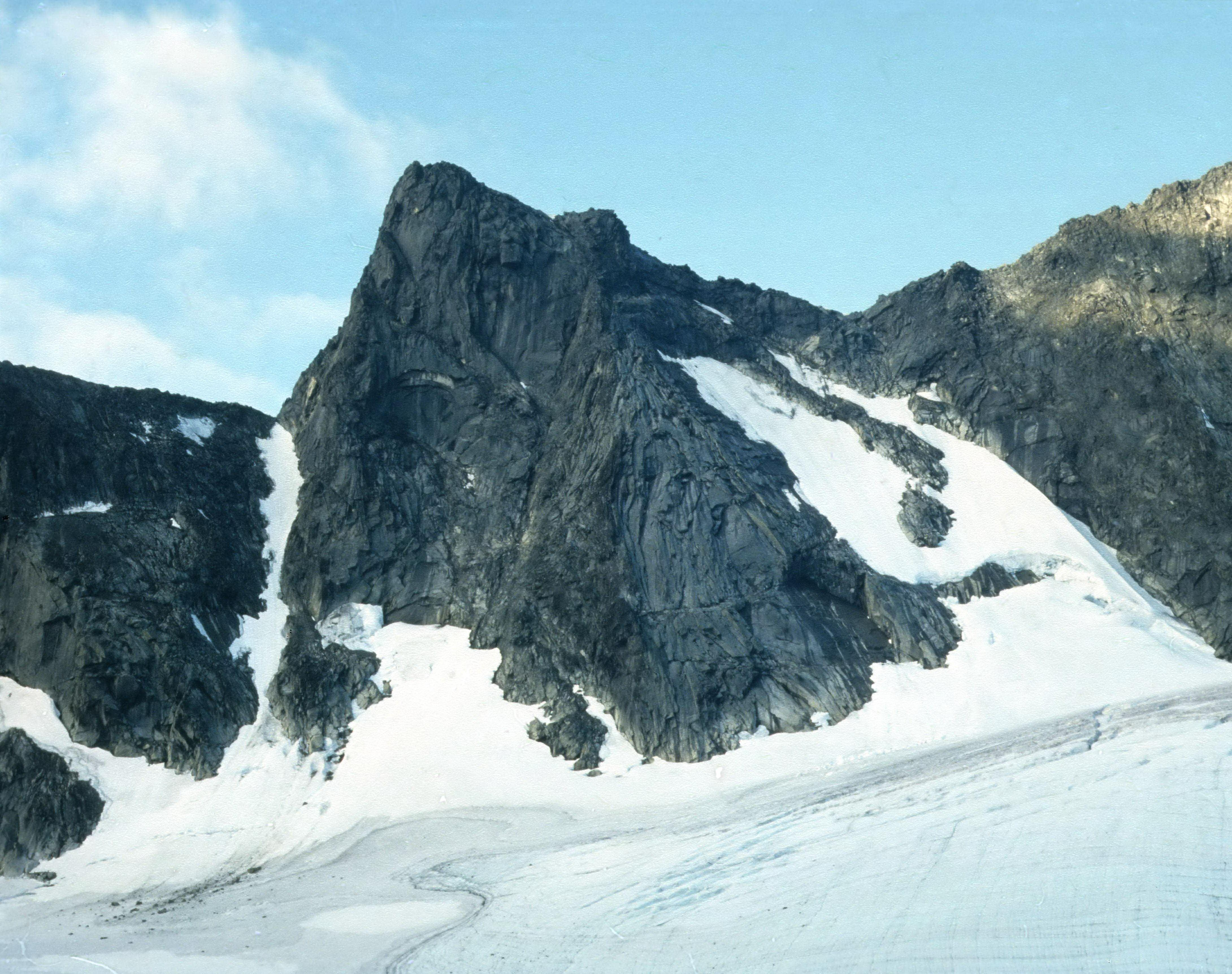 Søre Dyrhaugstind sett fra Skagastølsbreen